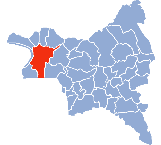 Auteur Hervé SUAUDEAU Licensing Catégorie:Cartes de Seine-saint-Denis Catégorie:Saint-Denis (Seine-Saint-Denis)